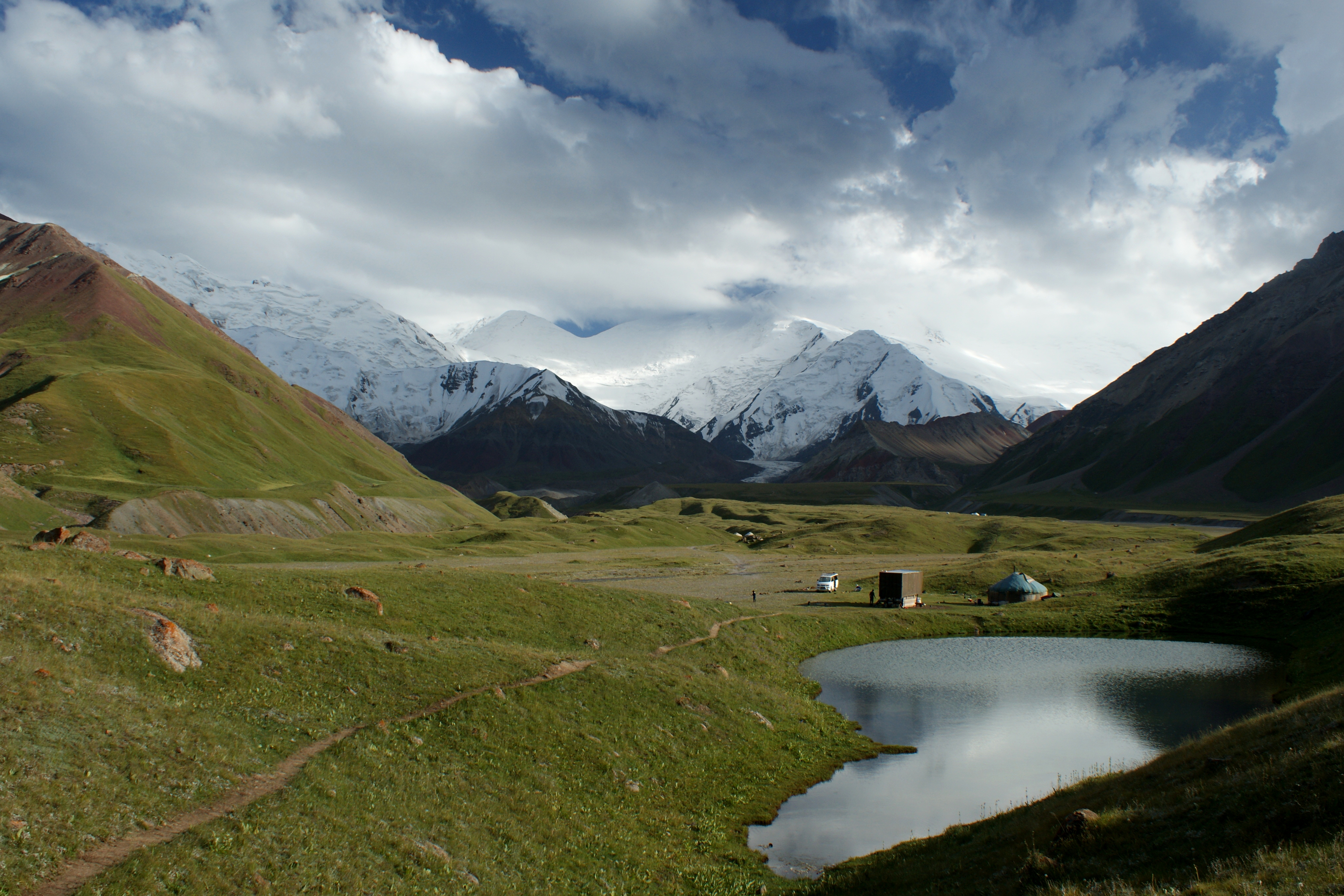 next to the base camp of lenin peak